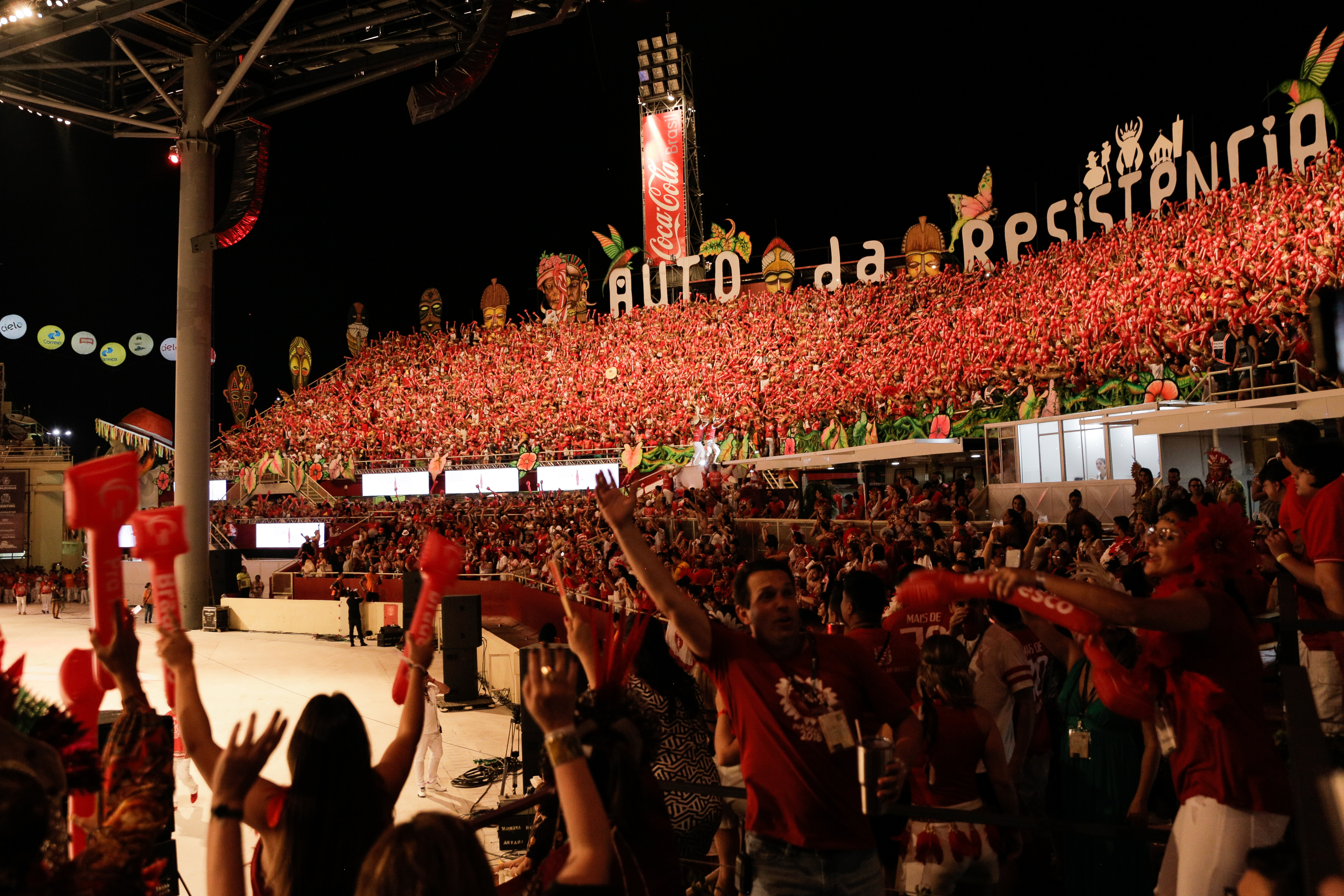 Nos dois dias de apresentações, o boi-bumbá Caprichoso, com seu azul e branco, e, o boi Garantido, caracterizado pelas cores vermelho e branco, encantaram o público com suas alegorias e toadas que revivem a lenda de Catirina e Pai Francisco, o cotidiano do caboclo ribeirinho e outros mitos amazônicos. 1/7/2018 Fotos: Clara Angeleas/MinC